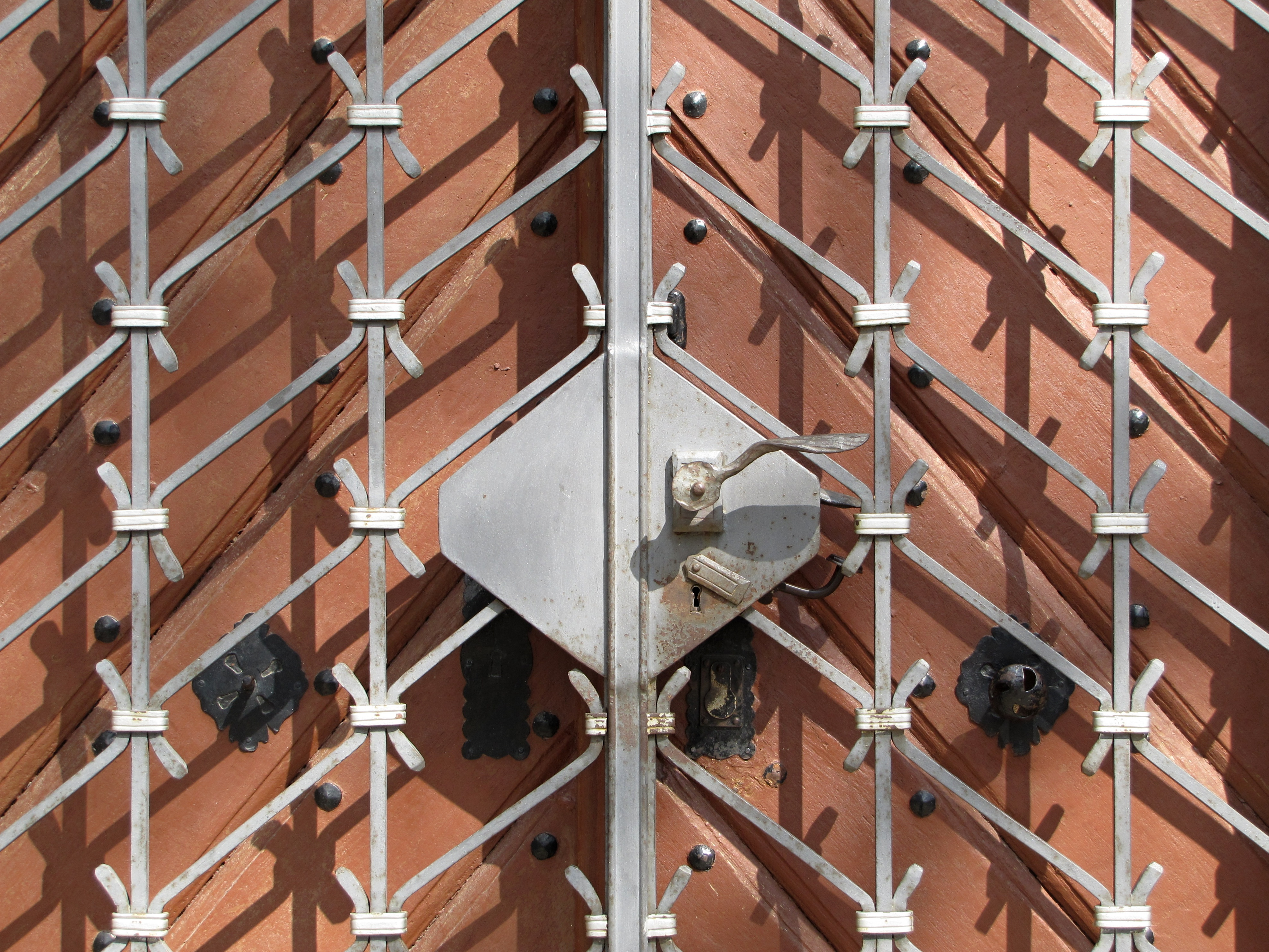 Kaple svatého Vendelína v Čejči, mříže na hlavním vchodu